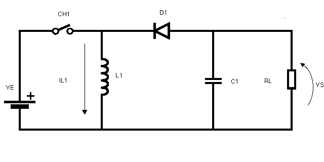 Circuito Elétrico de Conversor Boost, feito por SARSA em um mac (Clarisworks) e portado para Linux